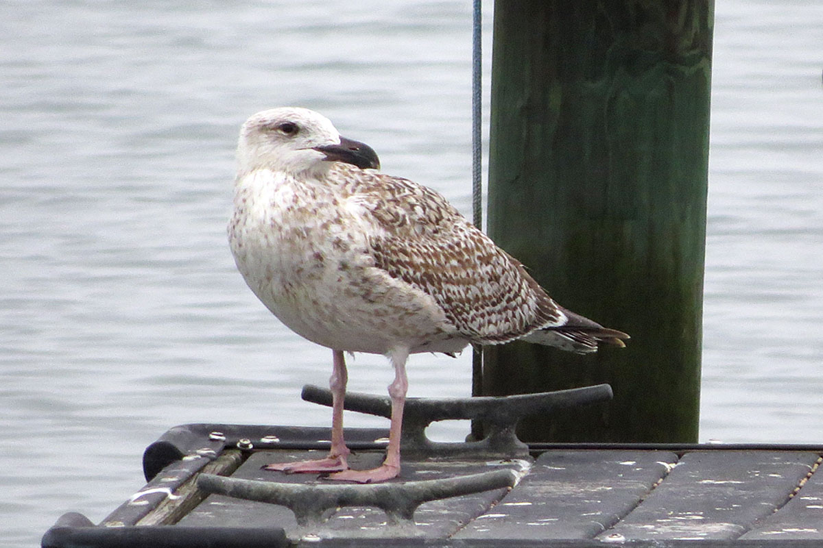 Larus marinus 13 jan 15 Litchfield, SC